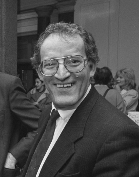 Max de Bok in 1987 terwijl hij Wim Klinkenberg bijstaat tijdens een kort geding tegen de TROS in verband met zijn gedwongen vertrek uit radioprogramma Journalistenforum